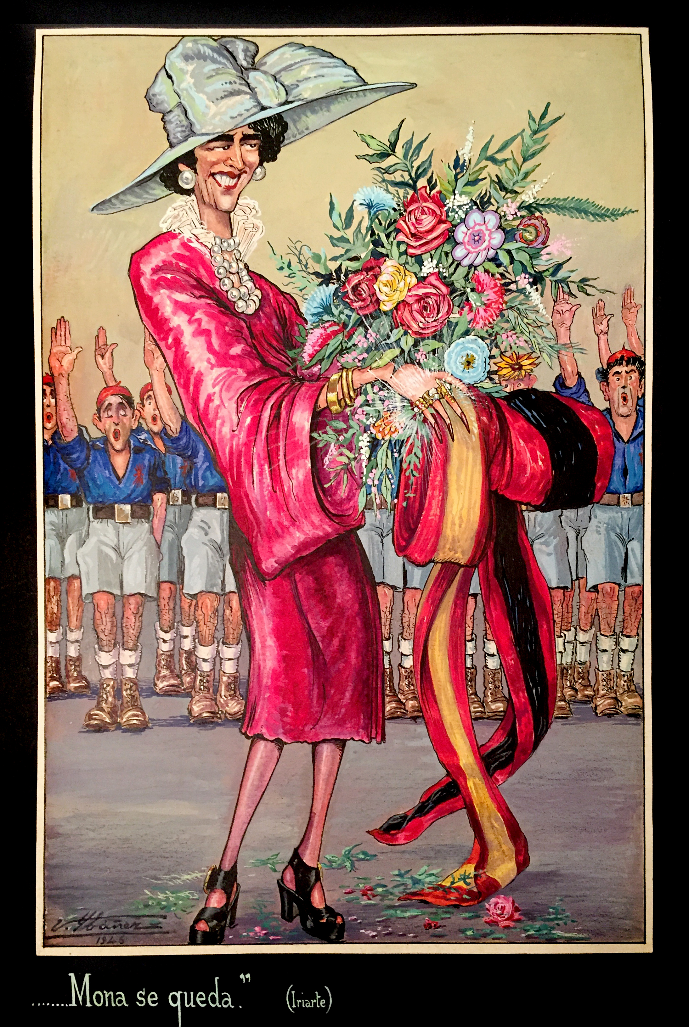 Mona se queda. 1946 Inédito. Colección familiar